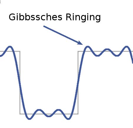 Gibbssches Phänomen bei einer Rechteckskurve Gezeichnet von Phrood